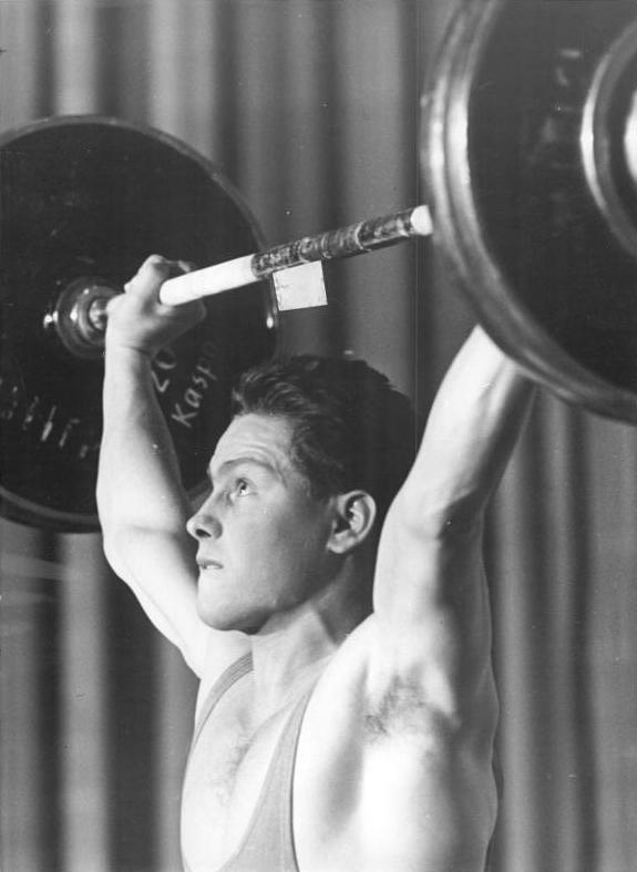 Karl Arnold Zentralbild Schmidt 29.04.1963 Deutsche Meisterschaften im Gewichtheben. Im Jugendklubhaus "Philipp Müller" in Halle wurden am 27. und 28.04.1963 Die Deutschen Meisterschaften im Gewichtheben entschieden. UBz: Karl Arnold (Motor Zittau) wurde im Mittelgewicht mit 392,5 kg neuer Meister im Olympischen Dreikampf. Abgebildete Personen: Arnold, Karl: Gewichtheber, DDR